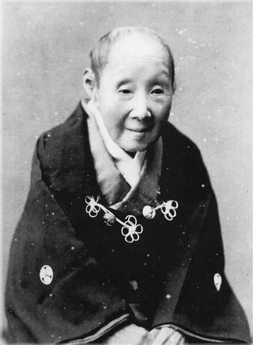 吉子女王(徳川斉昭の正室、徳川慶喜の母)の肖像写真。